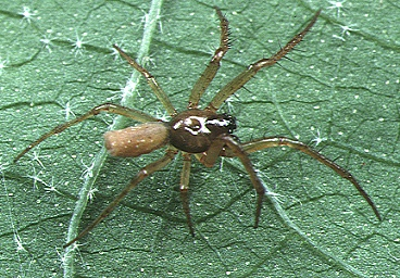 male Cyclosa ginnaga from Okinawa.